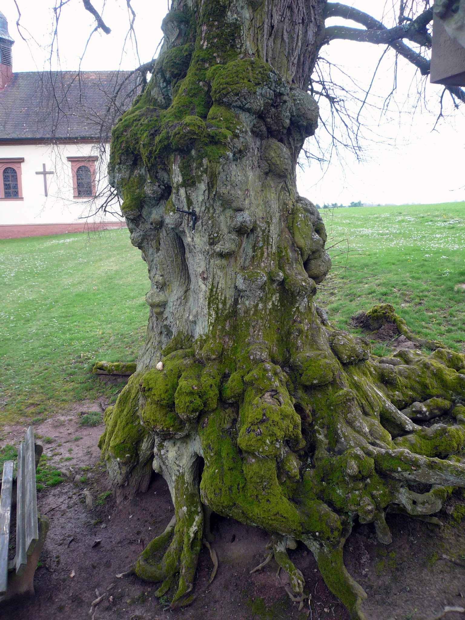 Linde bei Frankenbrunn